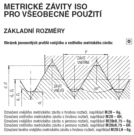 Náhled na vnější a vnitřní profil metrického závitu podle ISO.